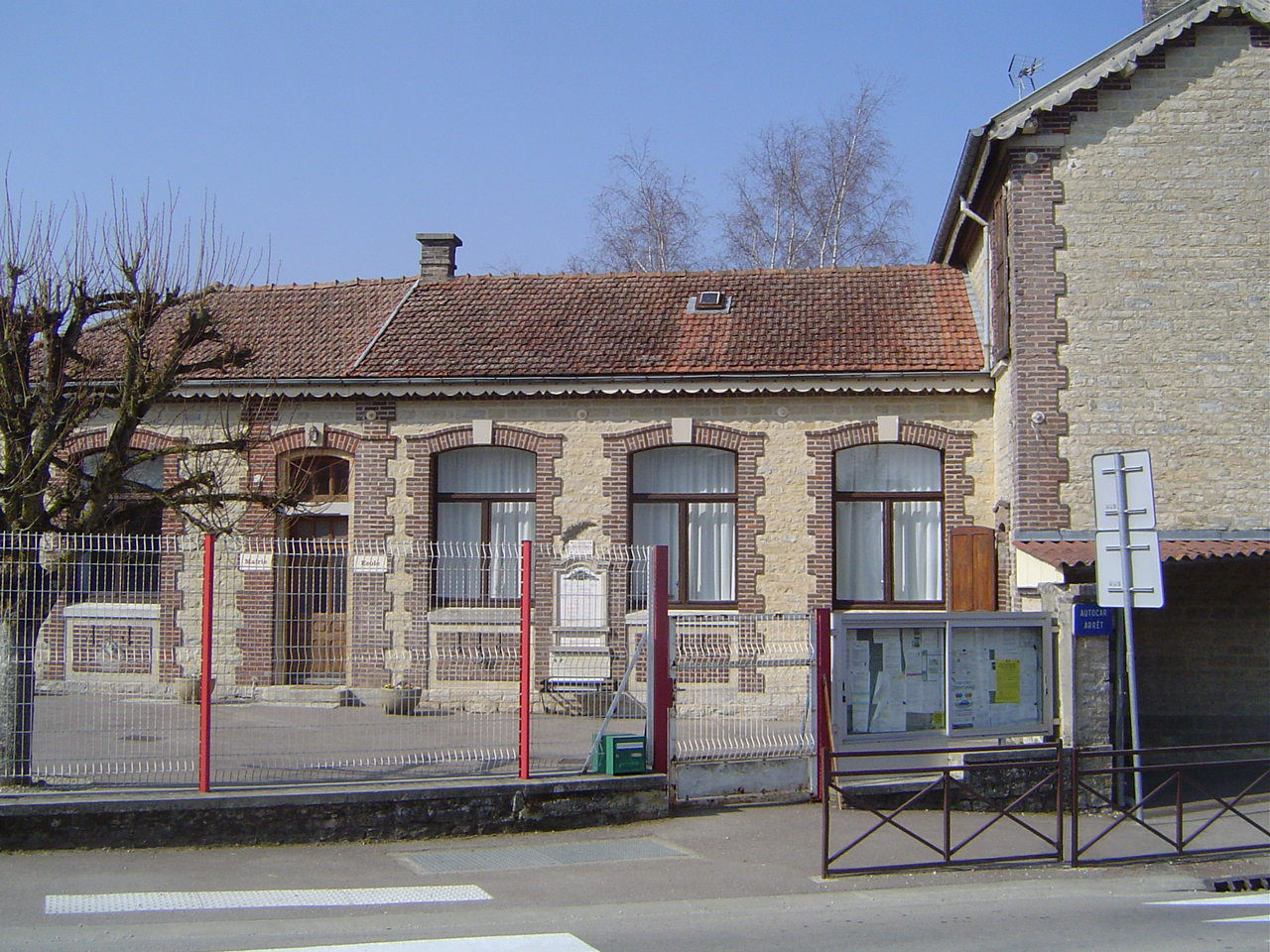 Villemereuil